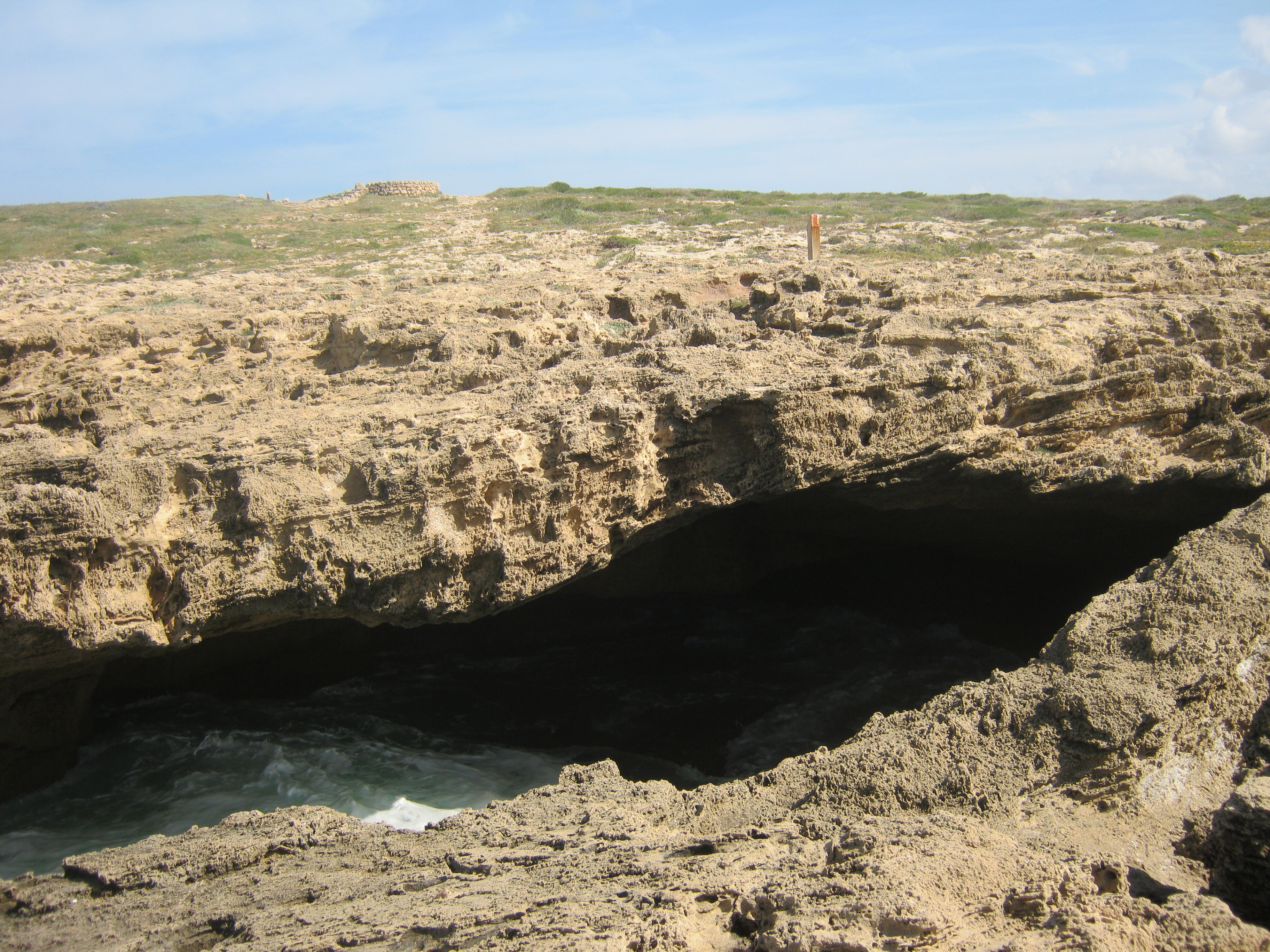 the blue cave in Dor-Habonim beach